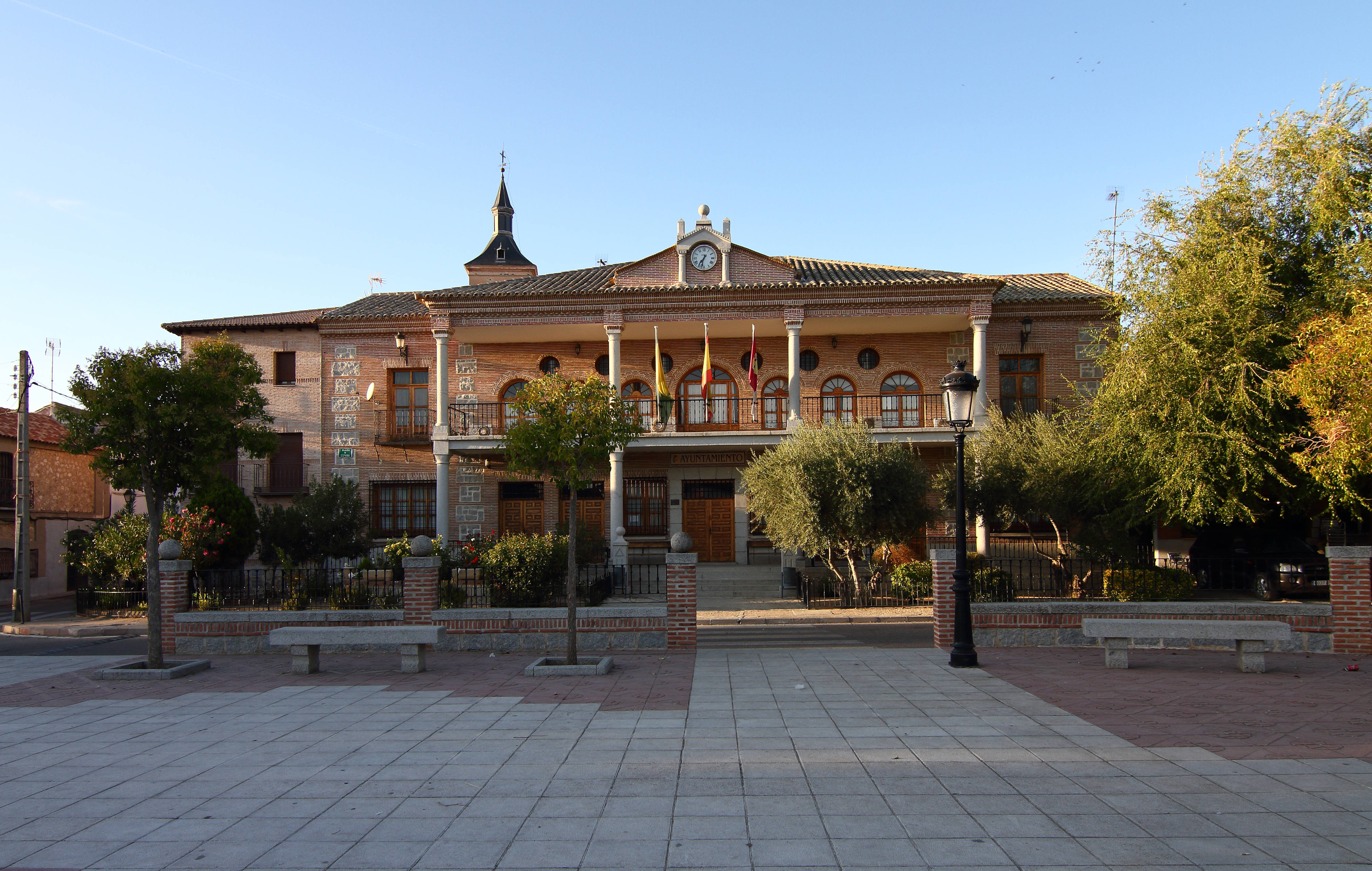 Ayuntamiento de Yunclillos